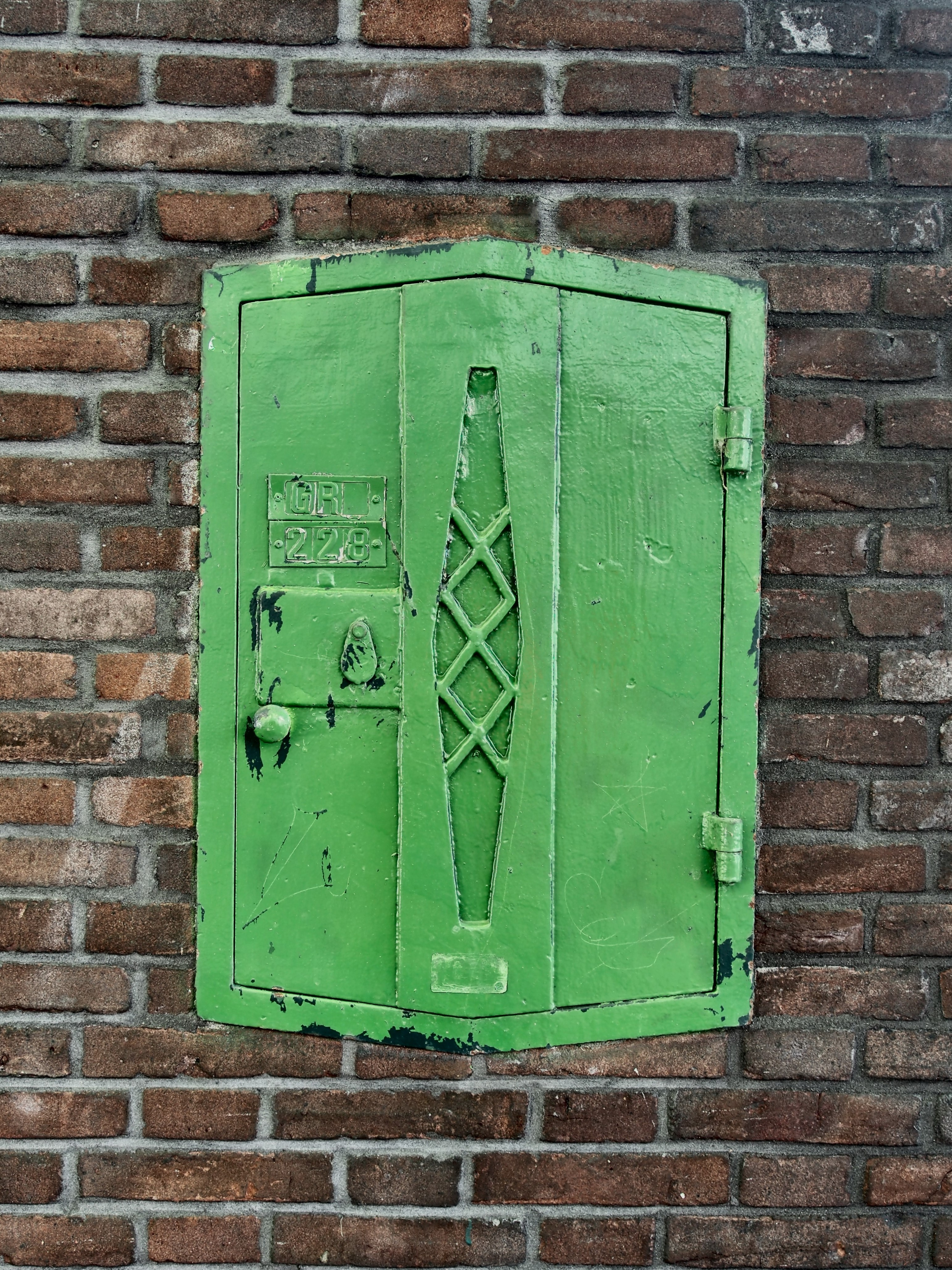 Mercatorstraat, elektriciteitshuisje in de stijl van de Amsterdamse School.